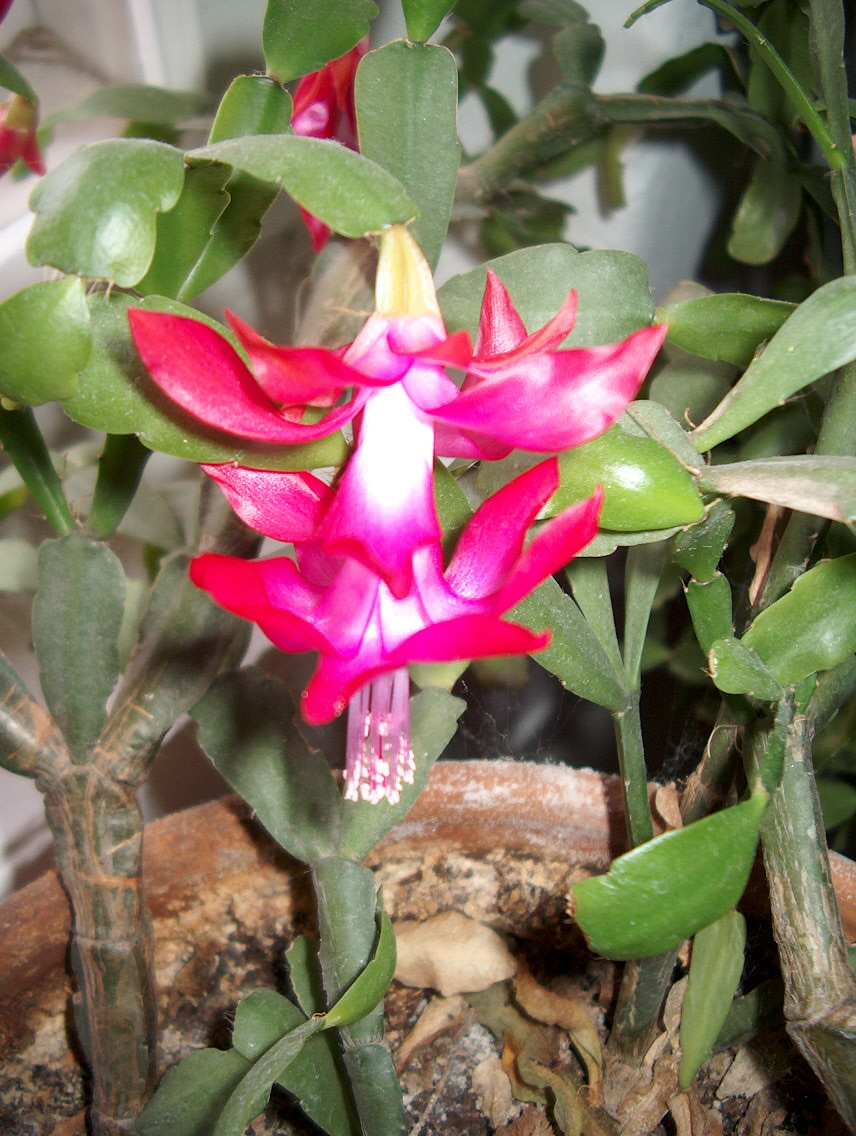 Karácsonyi kaktusz